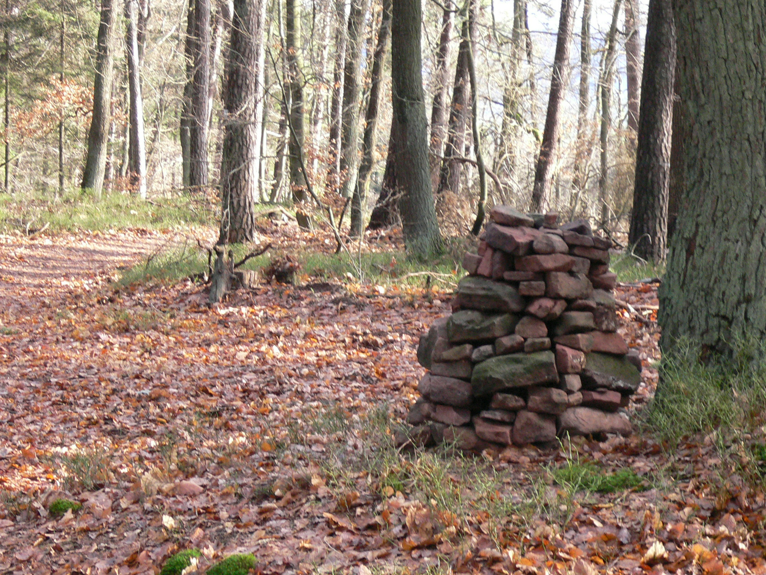 Steinmann als Wegzeichen im Pfälzer-Wald, im Aufbau befindlich